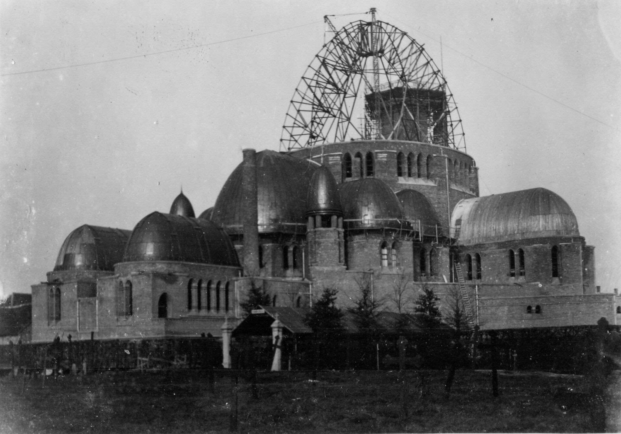 Bouw van de grote koepel van de Sint-Jan Waalwijk